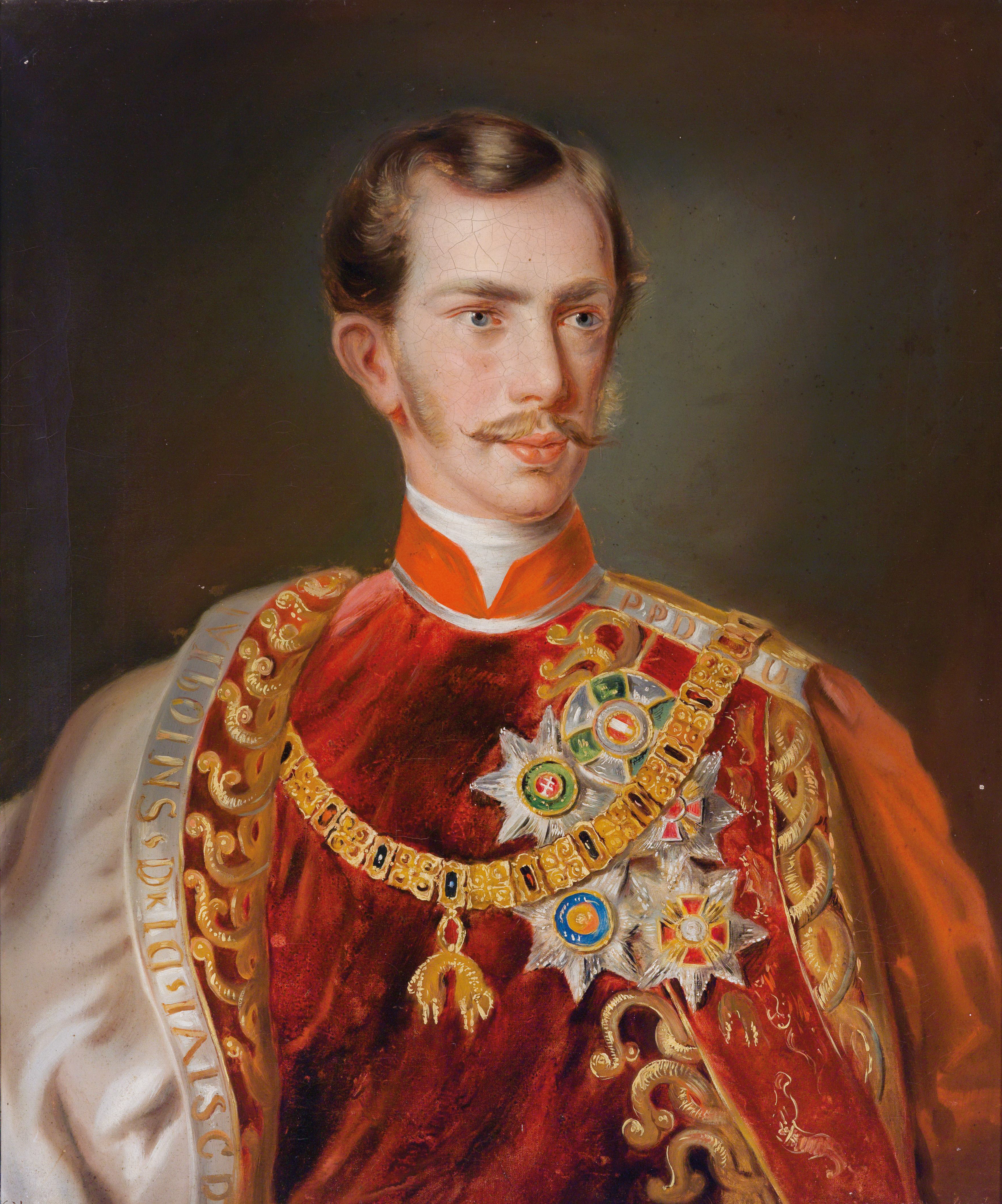 Porträt des jungen Kaisers im Ornat des Goldenen Vlies mit Ordensdekorationen